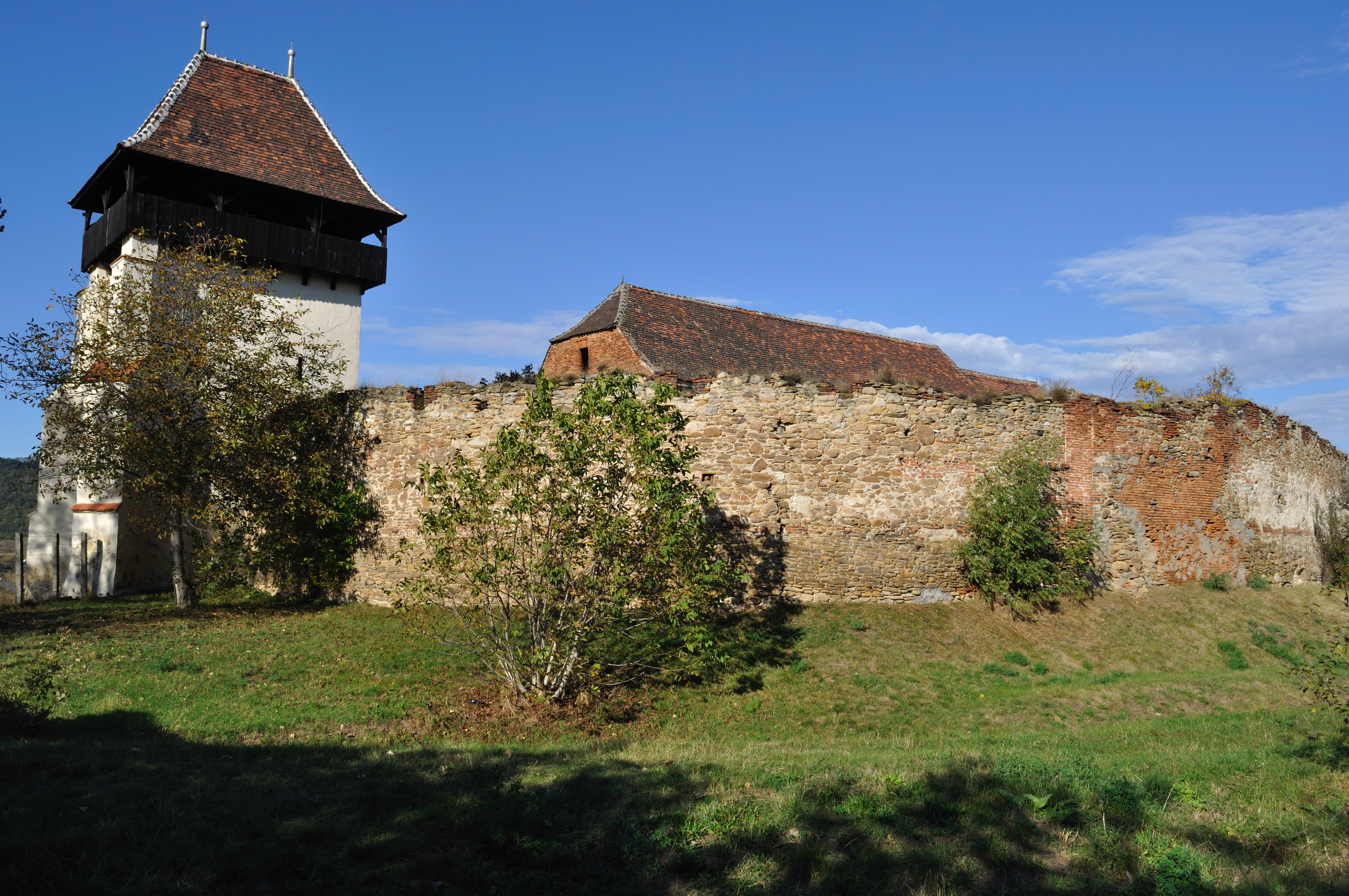 Biserica evanghelică din Țapu, Sibiu